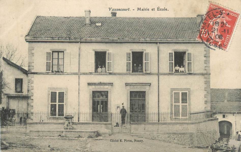 Carte postale de la mairie vers 1908